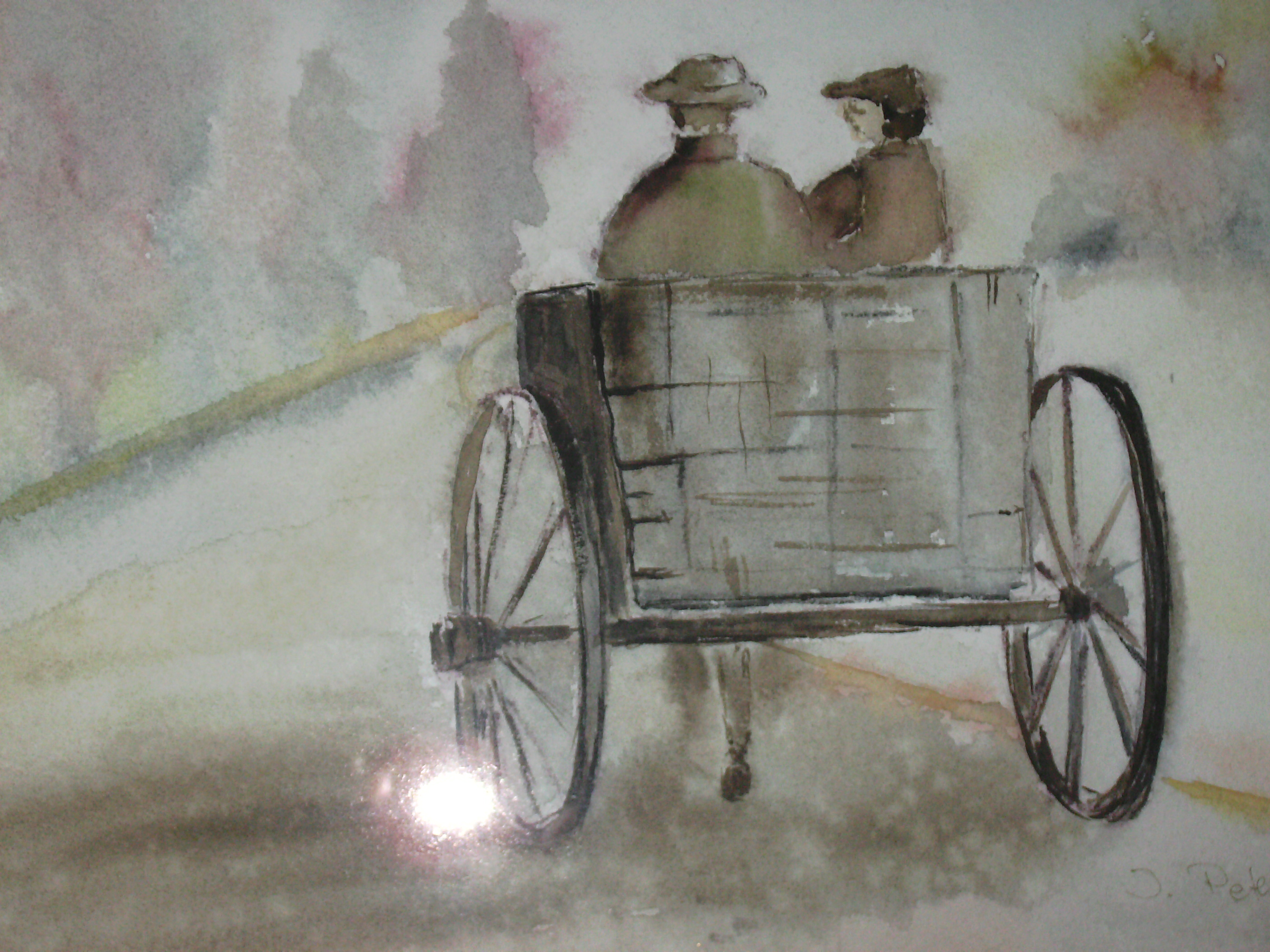 Gemälde von Ingrid Peters "Spanischer Pferdewagen" (Acryl/LW)